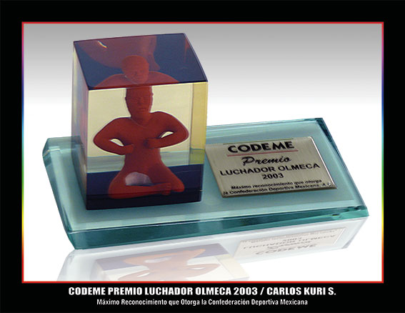 Reconocimiento a Carlos Kuri, por su desarrollo como deportista de alto rendimiento, CODEME, Luchador Olmeca 2003.